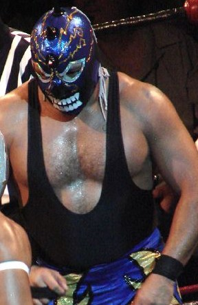 Mephisto lucha en el Consejo Mundial de Lucha Libre, haciendo equipo con Averno, donde fueron los Campeones Mundiales en Parejas del CMLL.